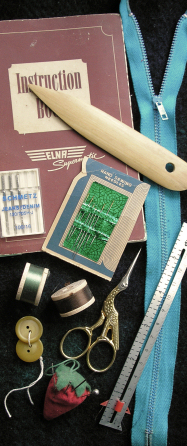 Sewing tools